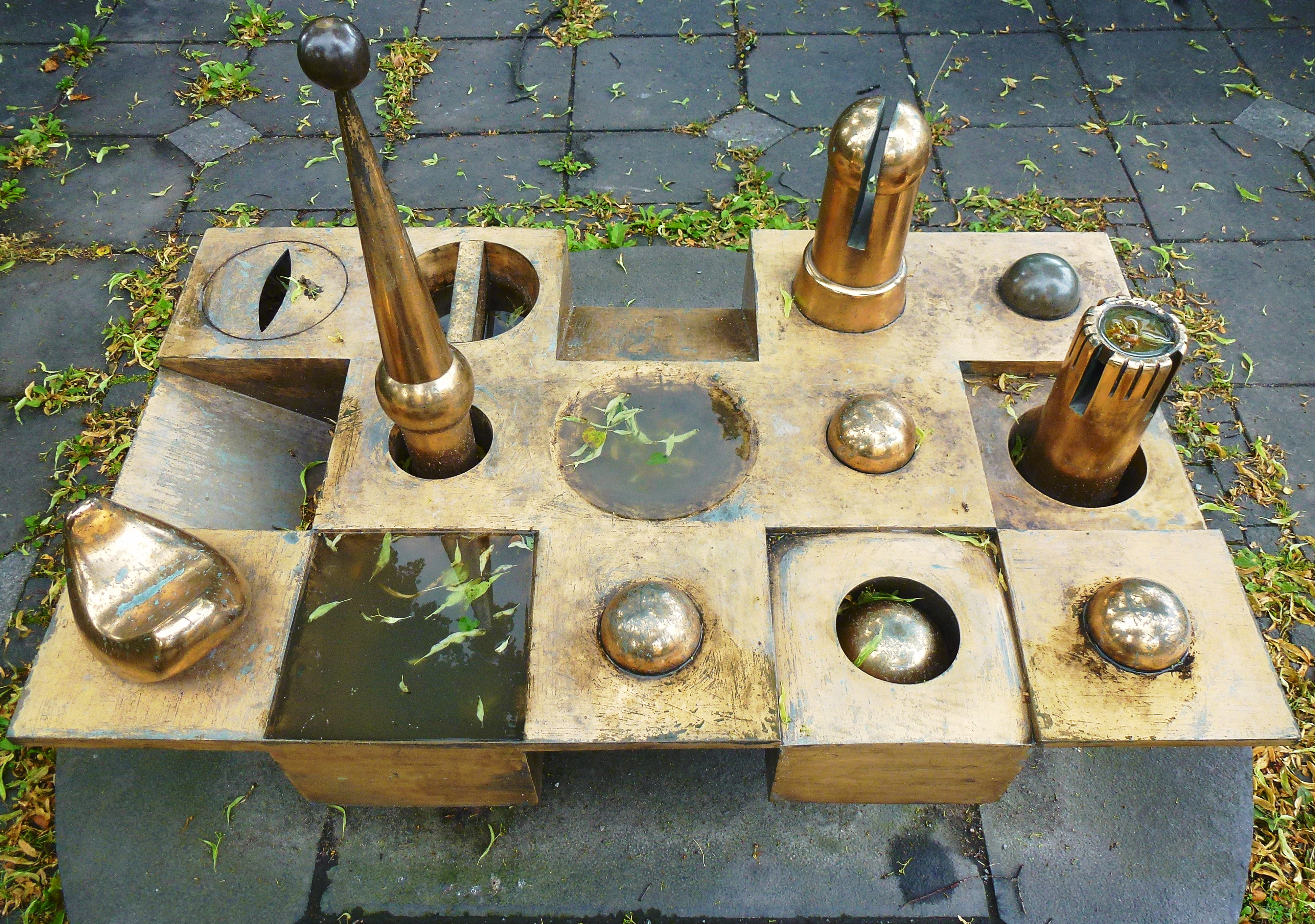 Lars-Erik Husberg´s "Staden" (The City), Karlavägen, Stockholm